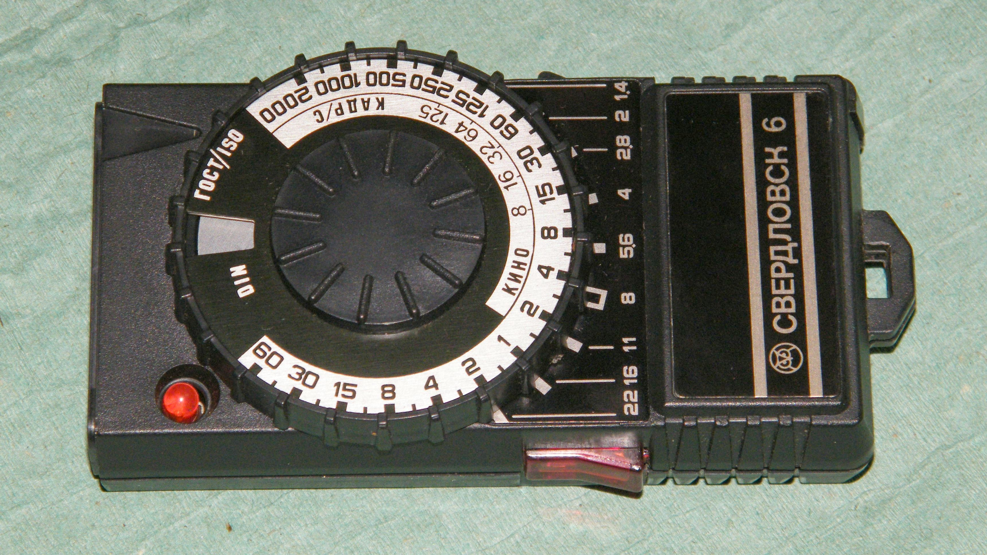 Фотоэкспонометр Свердловск-6